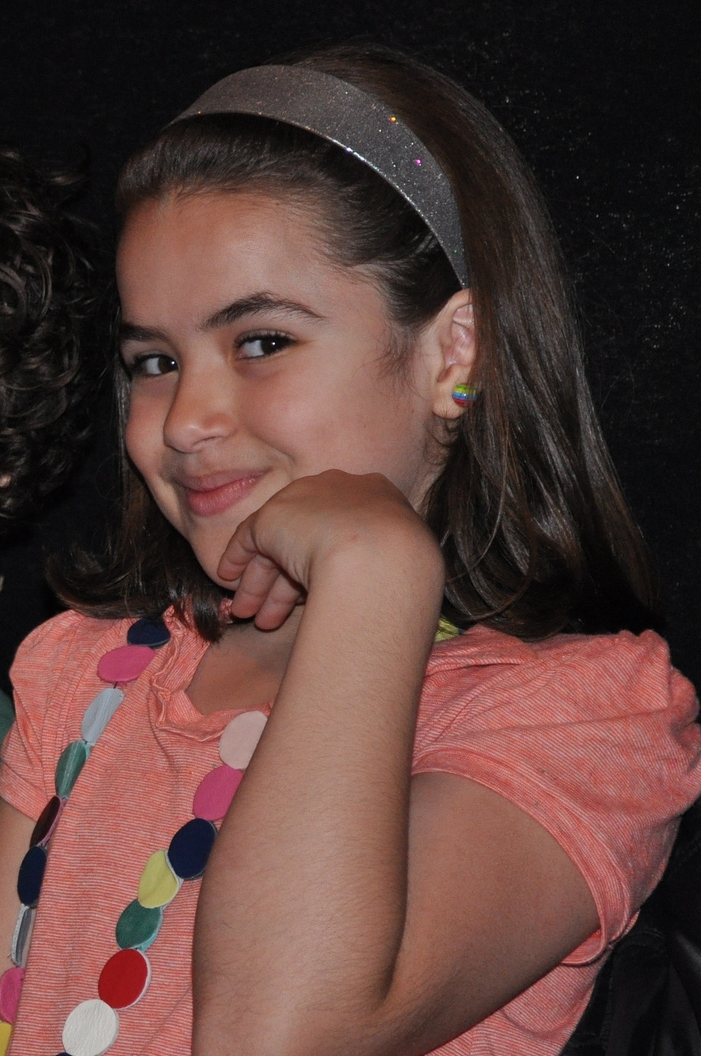 Maisa Silva